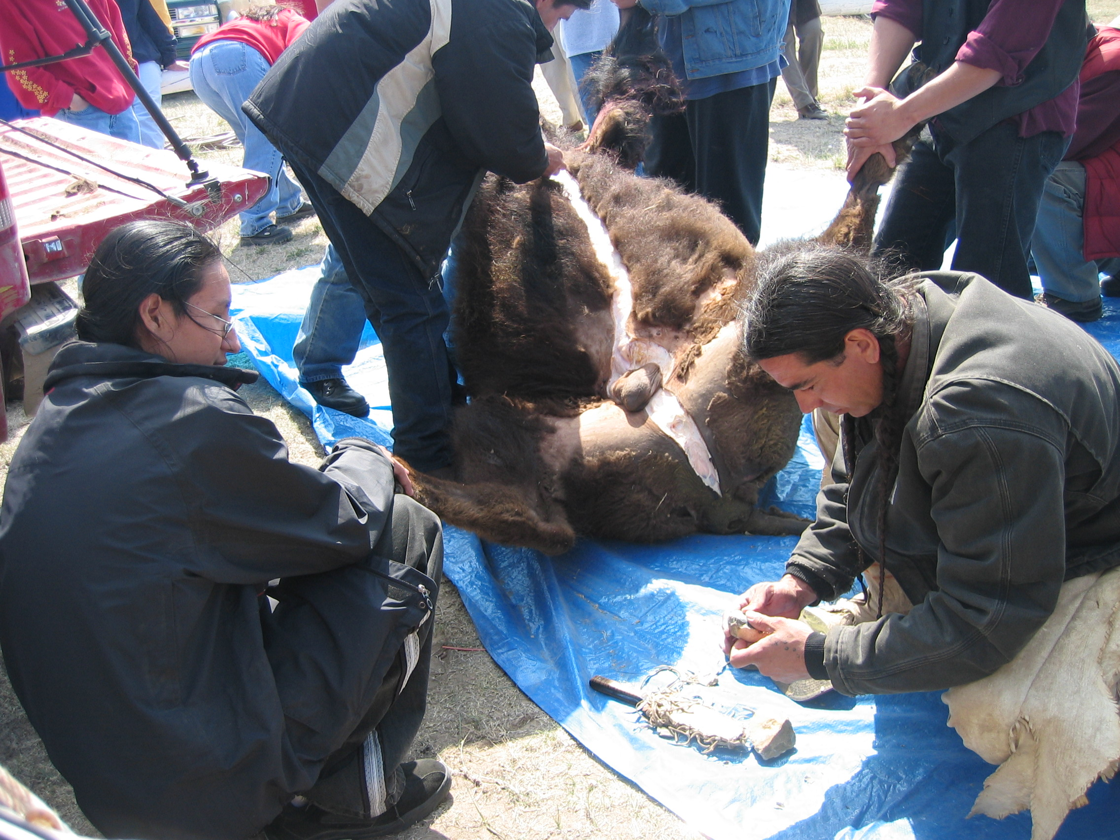 Dépeçage d’un bison pour les enfants du collège de Wanbli, Pine Ridge, South-Dakota, USA Préparation des pierres pour le dépecage